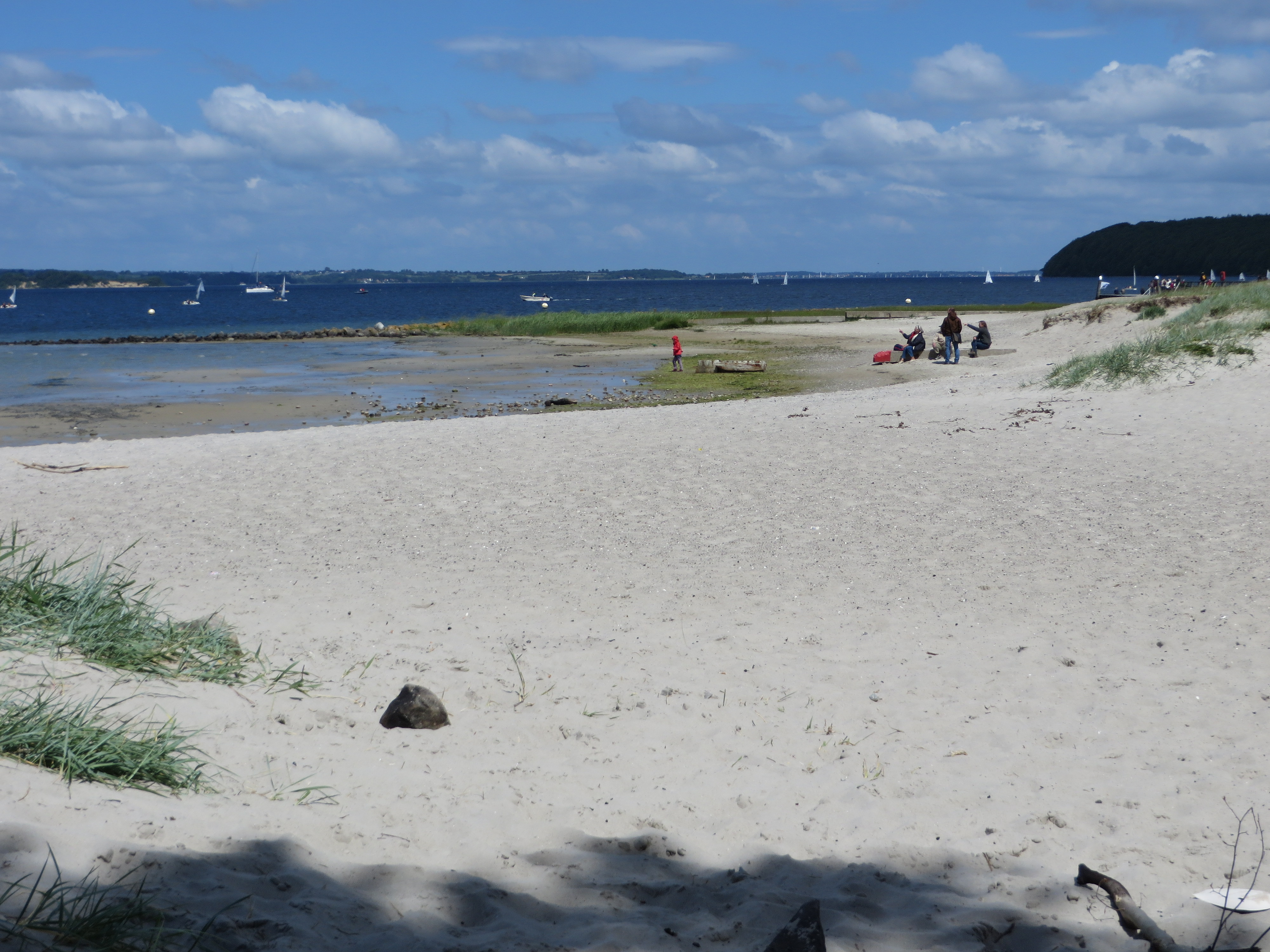 Solitüder Strand zum Sommer hin (Flensburg-Mürwik am 20. Juni 2015), Bild 007